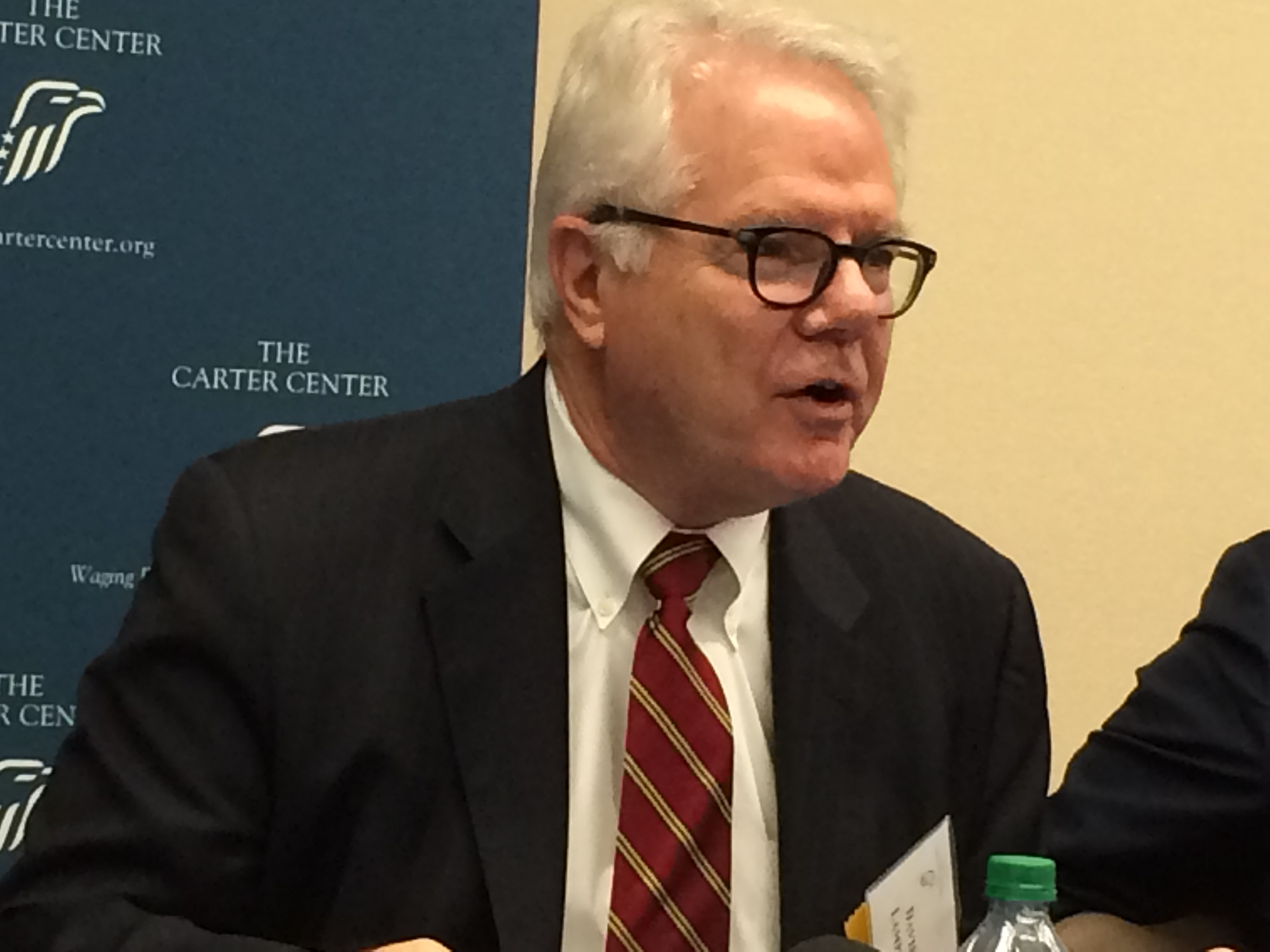 美国约翰.霍普金斯大学高级国际研究学院教授兼中国研究系主任蓝普顿